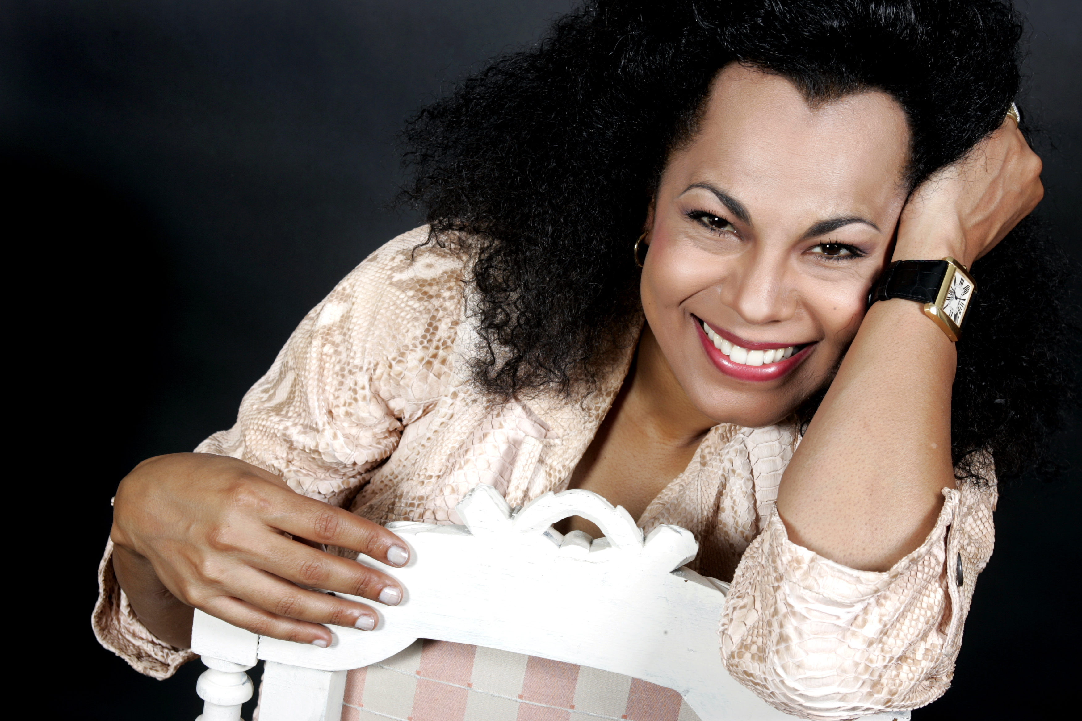 Isabelle Kabatu, soprano